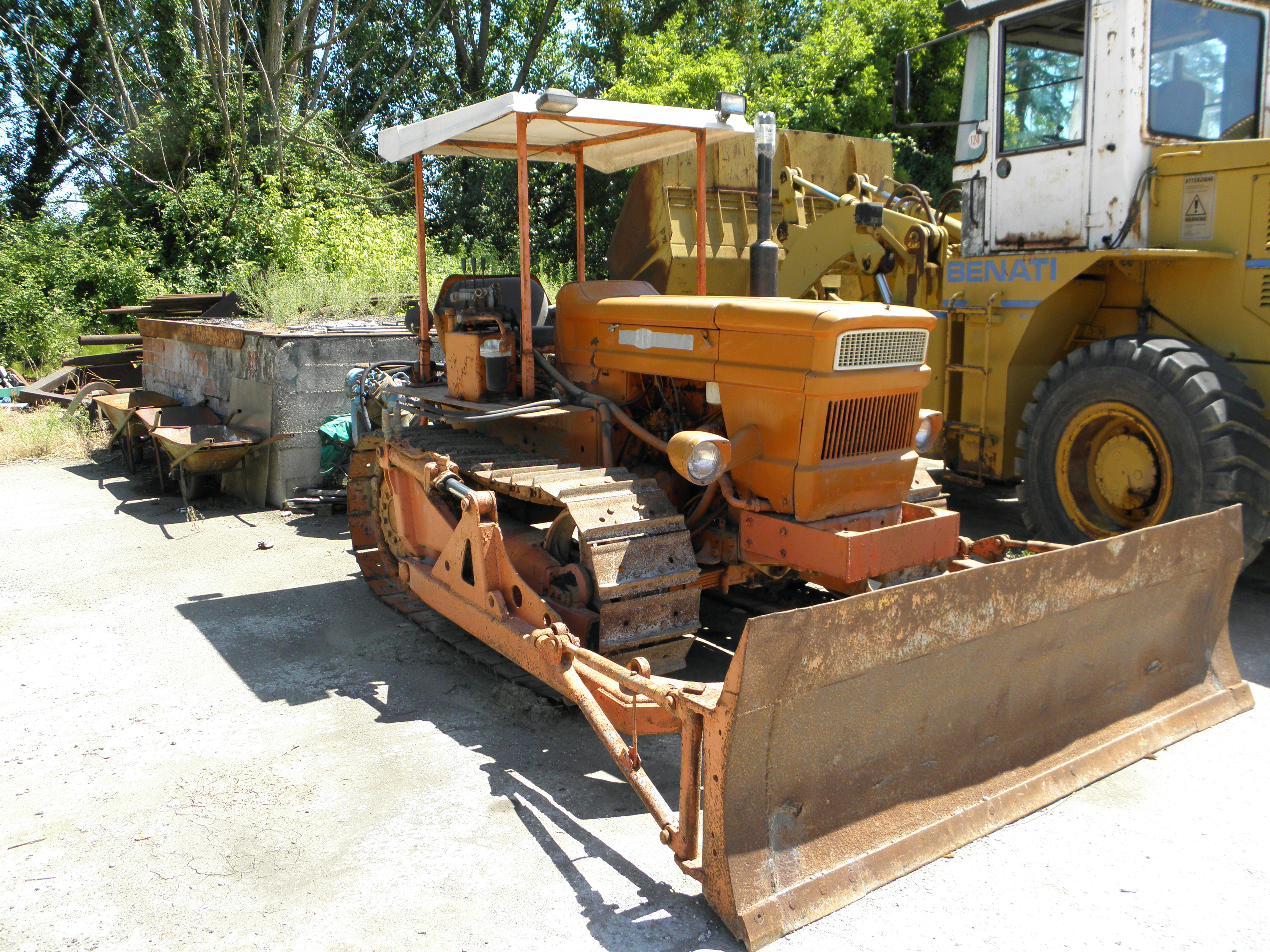 Rovigo, parco dell'azienda Macchine Agricole Previato: trattore cingolato OM 655 C (credo, il fregio era molto consumato ma è tipico OM e non FIAT).